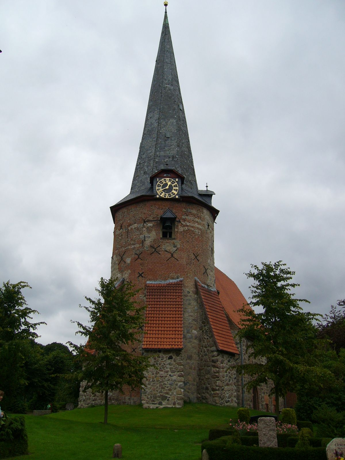 Kirche in Pronstorf; gebaut ca 1100